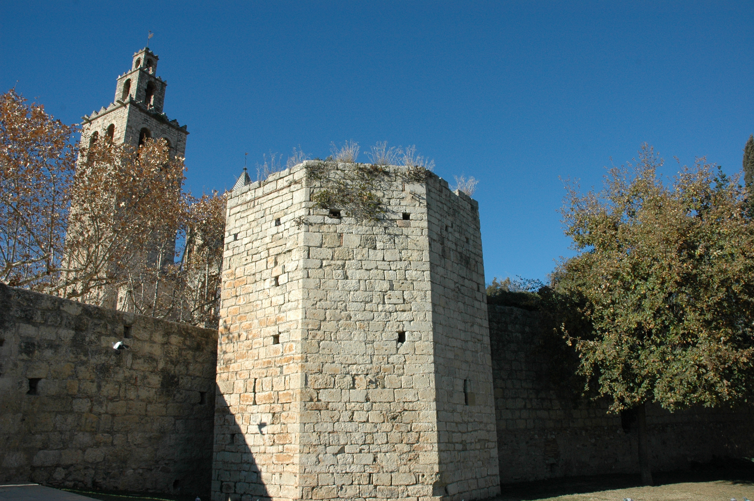 Monestir de Sant Cugat - Detall muralles de llevant